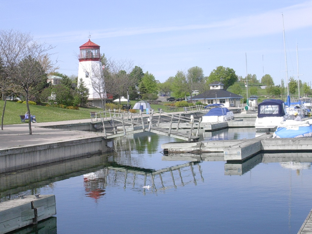 Prescott, Ontario, Canada